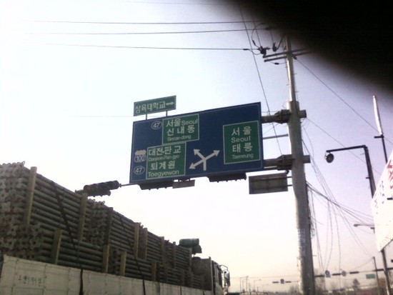 Gurl's GalMaeDong 4 street is Seoul two way. Seoul's Taelug and Seoul's ShinNaeDong.